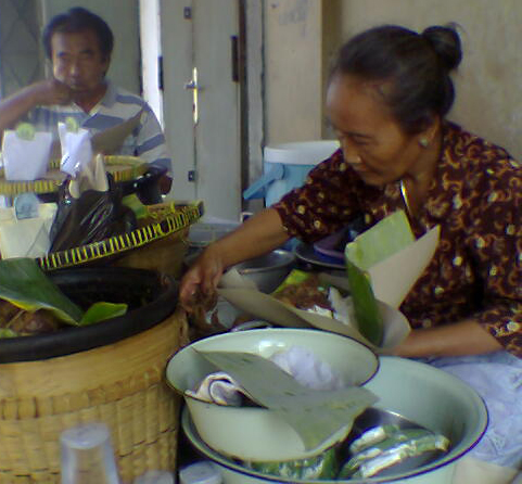 Gudeg seller in Surakarta